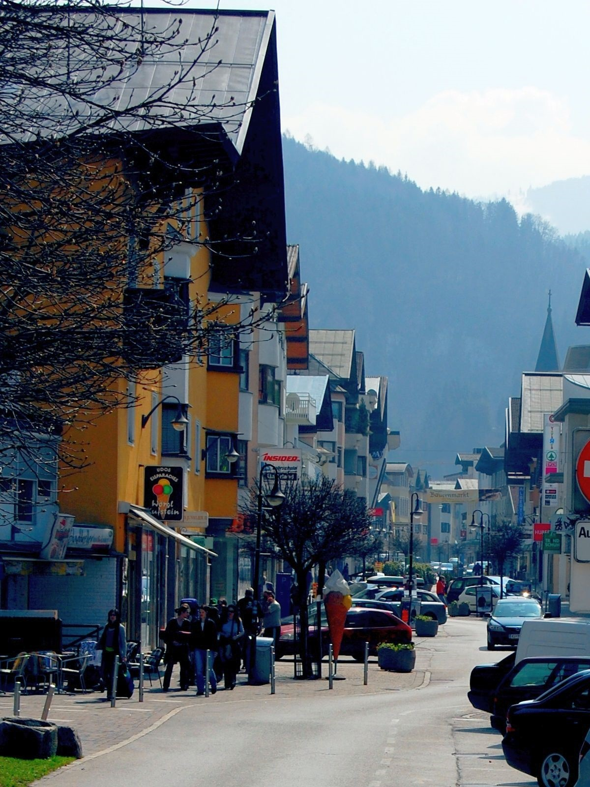 Bahnhofstraße Wörgl, Tirol, Österreich